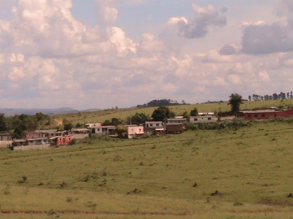 São Vicente de Minas, Minas Gerais, Brasil.